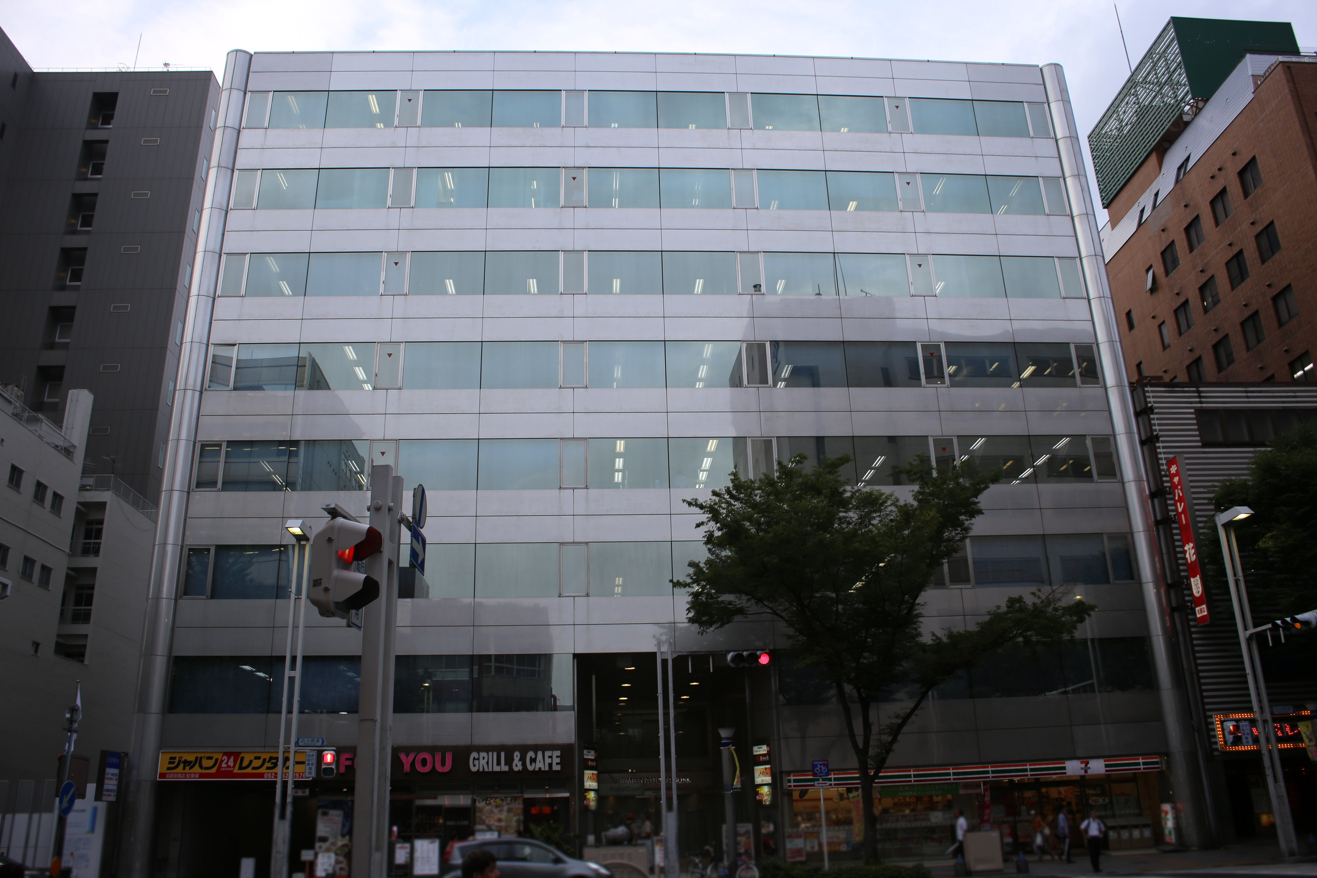 名古屋市中村区名駅四丁目のEME名古屋ビルを南側公道より撮影。ただし、肖像権保護のため、画像下部において画像処理済。